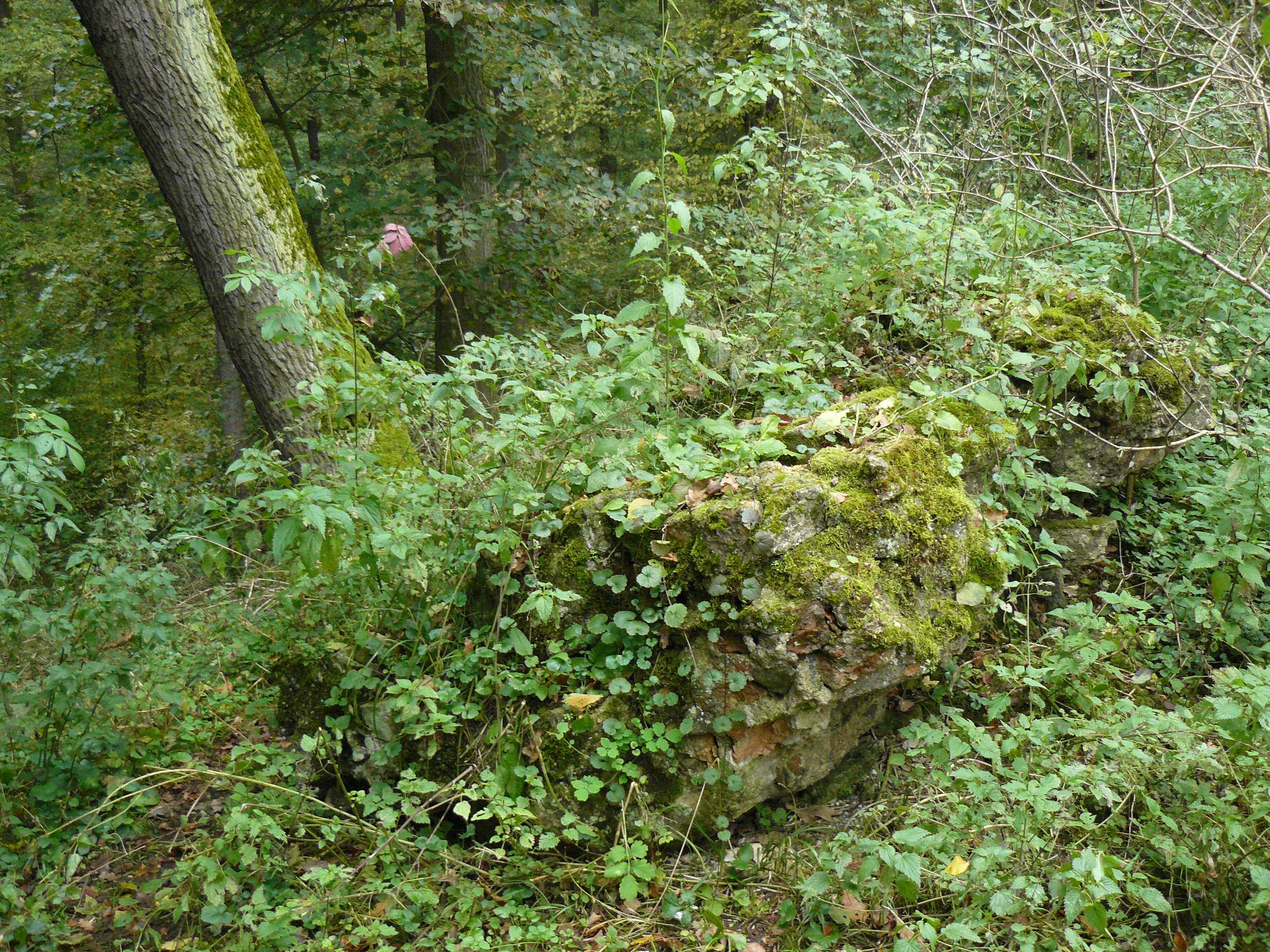 Přírodní Rezervace Mydlovarský luh - zbytky zdí hradu Mydlovar zarostlé vegetací